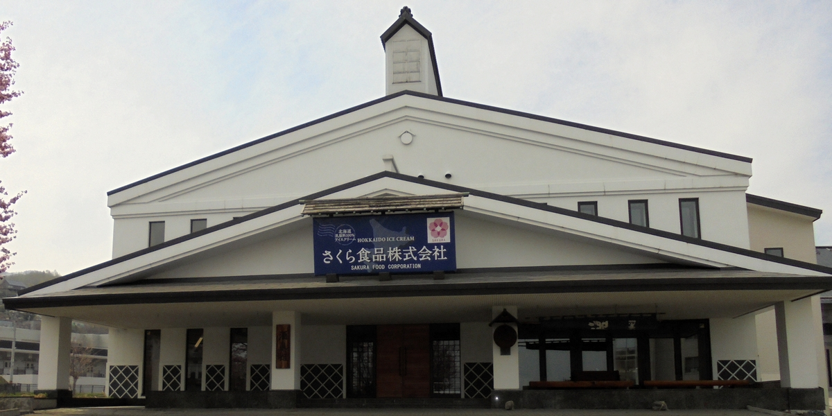 さくら食品 / 旧北の誉酒造酒泉館 (Sakura shokuhin / Kita no Homare, Otaru-shi, Japan)